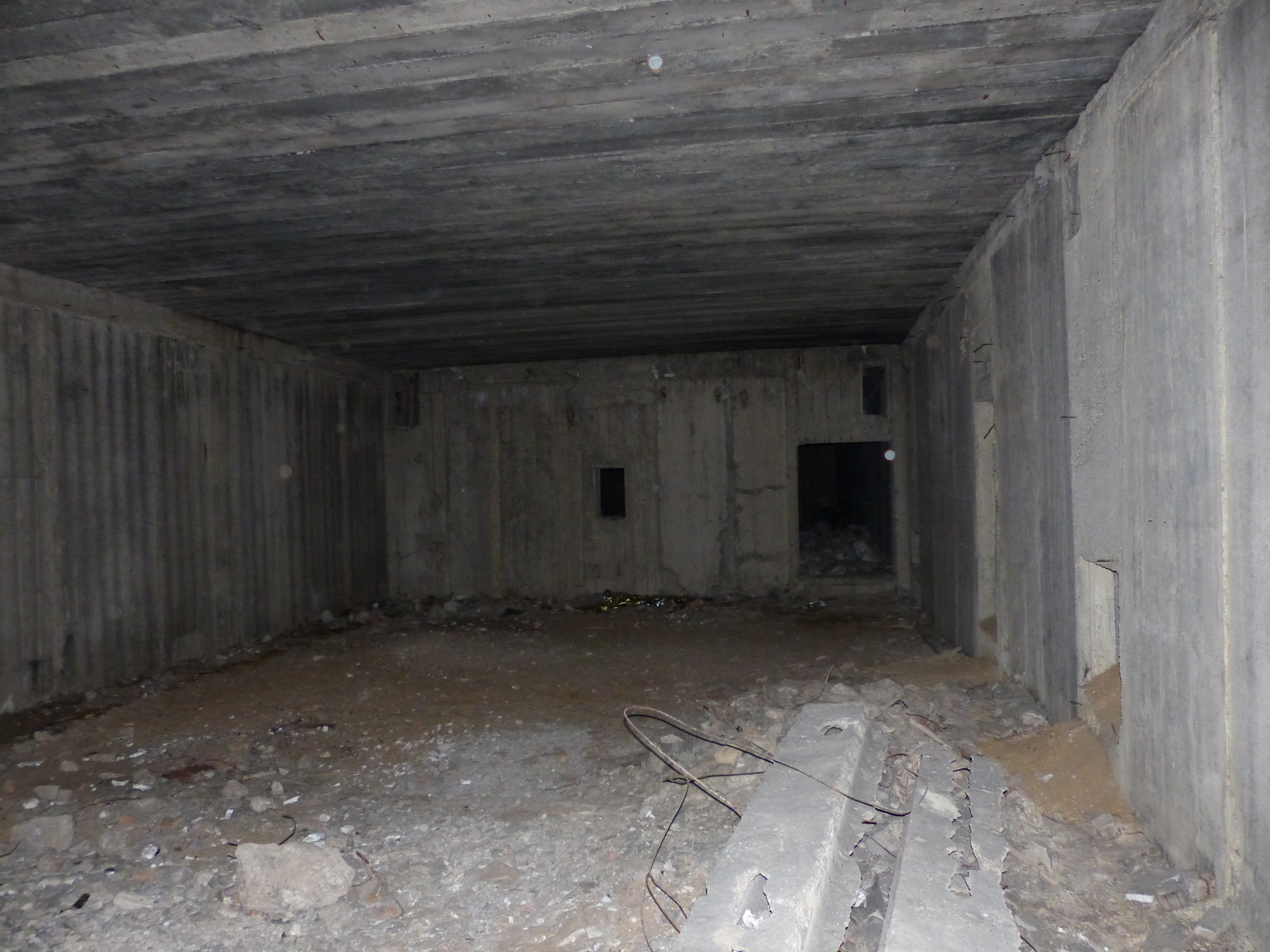 Inner halls of object #3